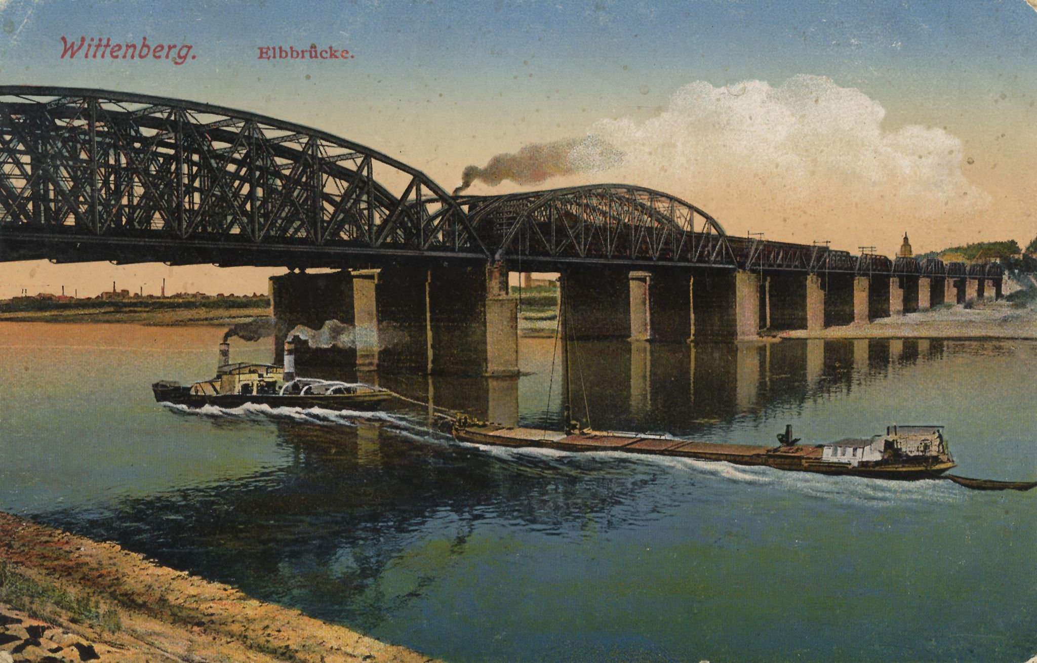 Postkarte mit den Elbbrücken Wittenberg, Datierung ungewiss, aber zwischen 1906 und 1926; Elbe mit Schleppkahn; Dampflok auf Elbbrücke